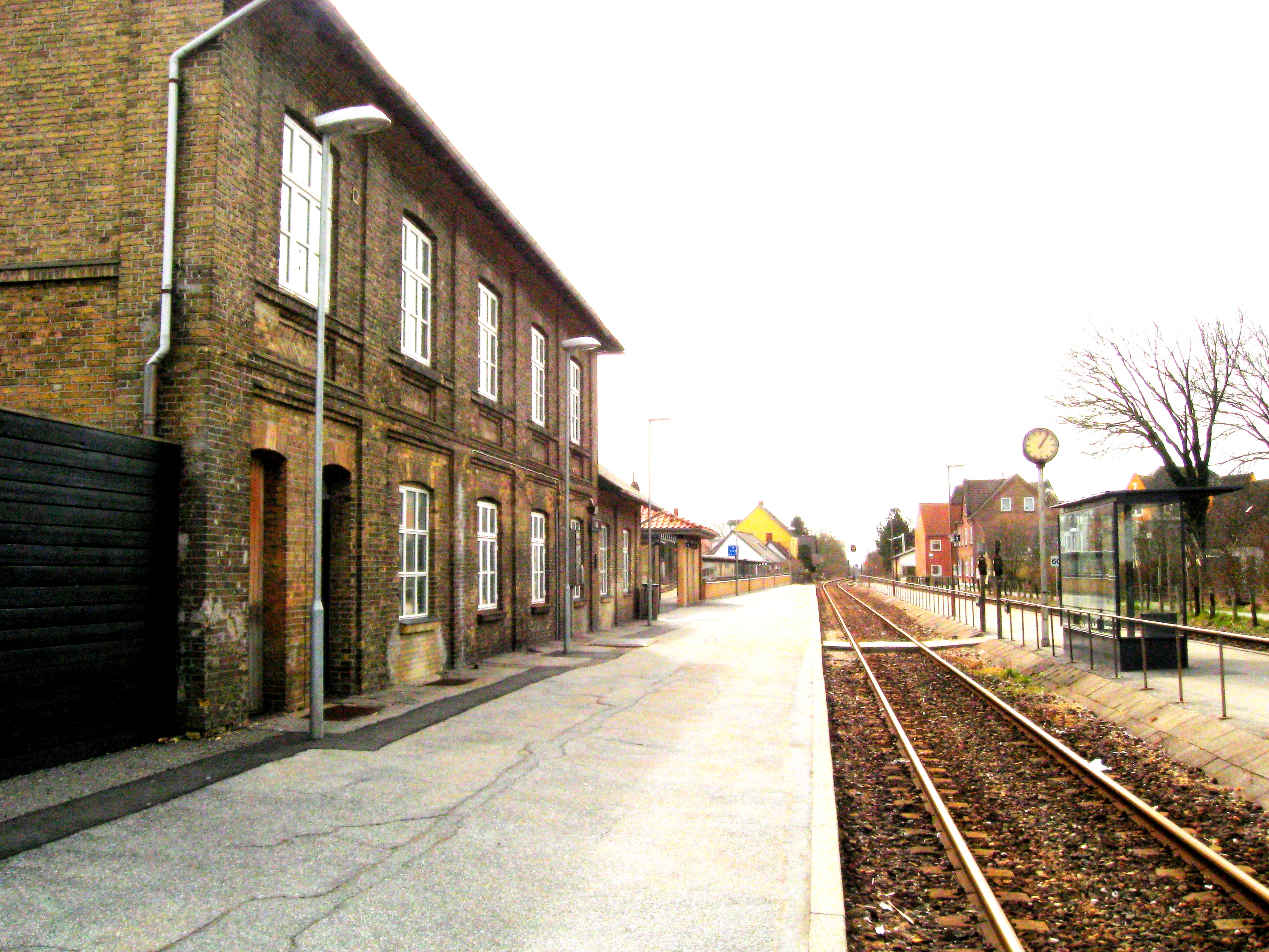 VRÅ STATION, 2009